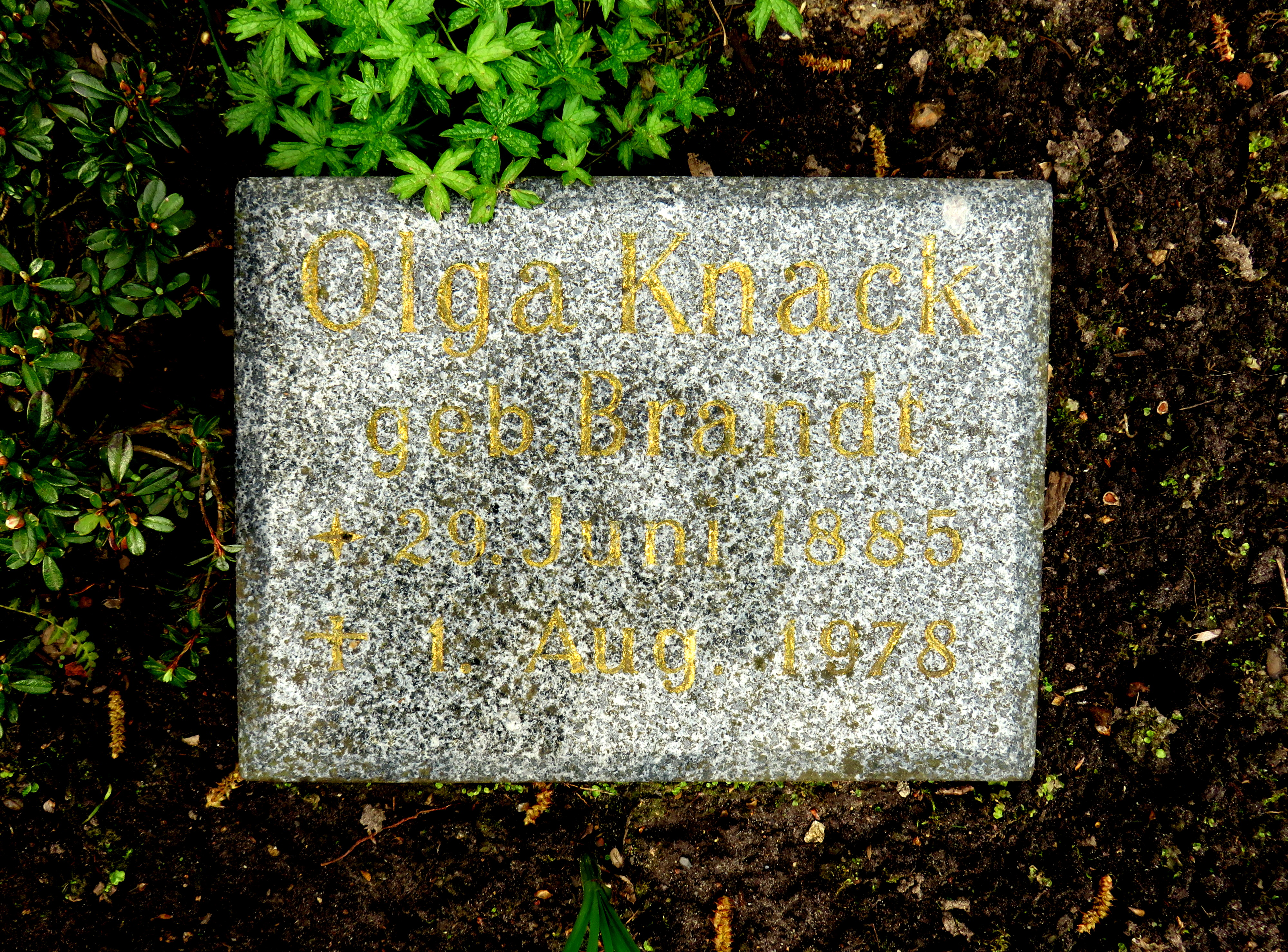 Historischer Grabstein der Hamburger Politikerin Olga Brandt-Knack im Bereich des Gartens der Frauen auf dem Ohlsdorfer Friedhof in Hamburg-Ohlsdorf.